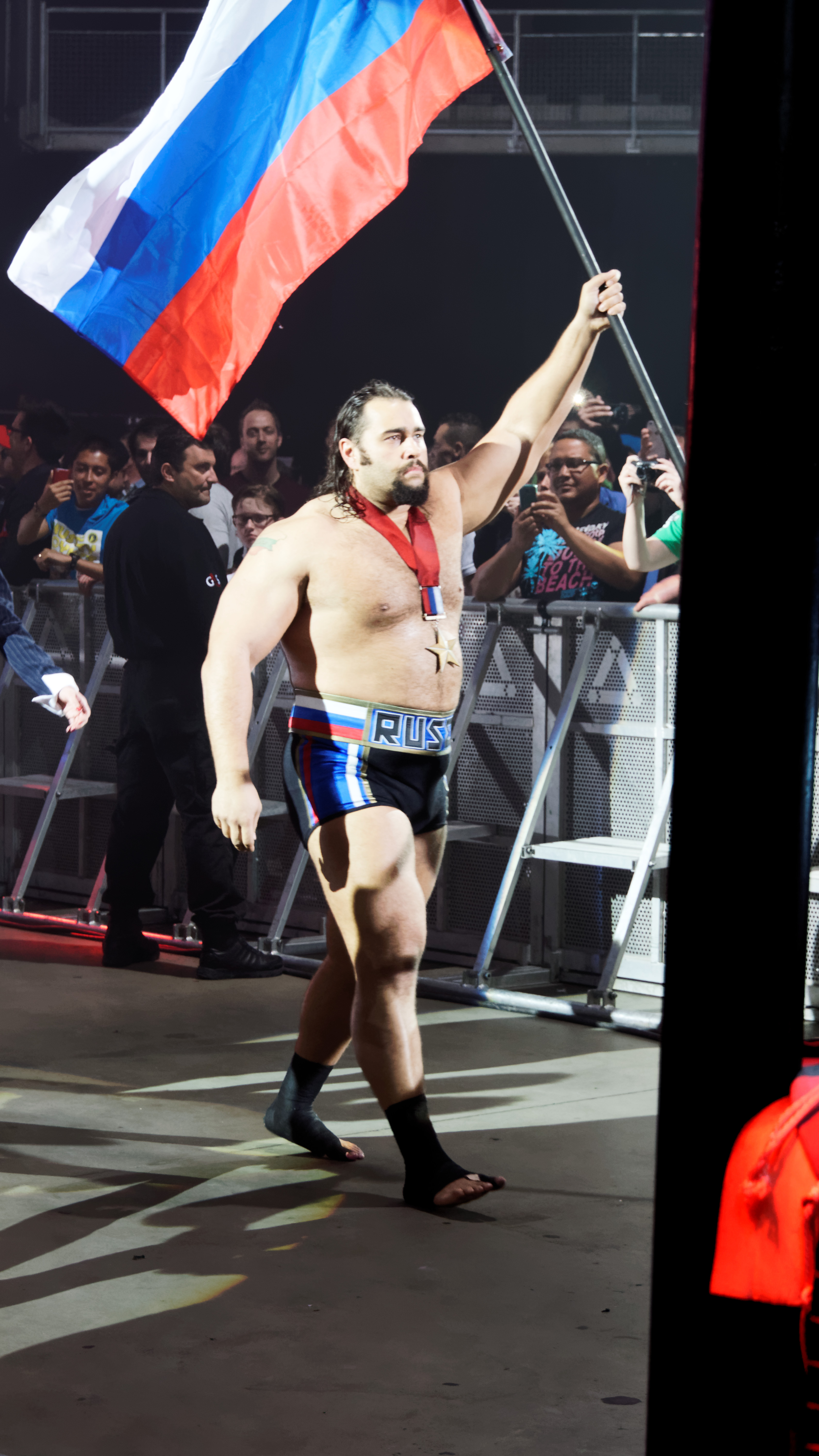 WWE Live@Lotto Arena - Antwerpen